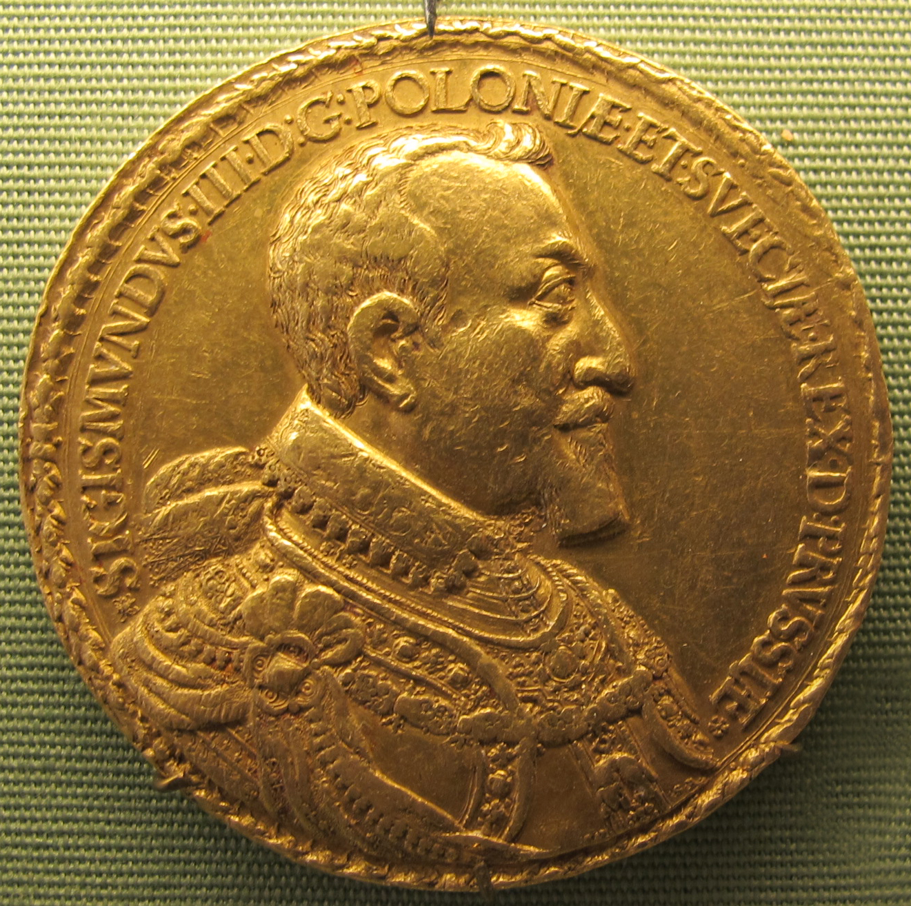 Samuel ammon, sigismondo III di polonia, oro, 1617-1619